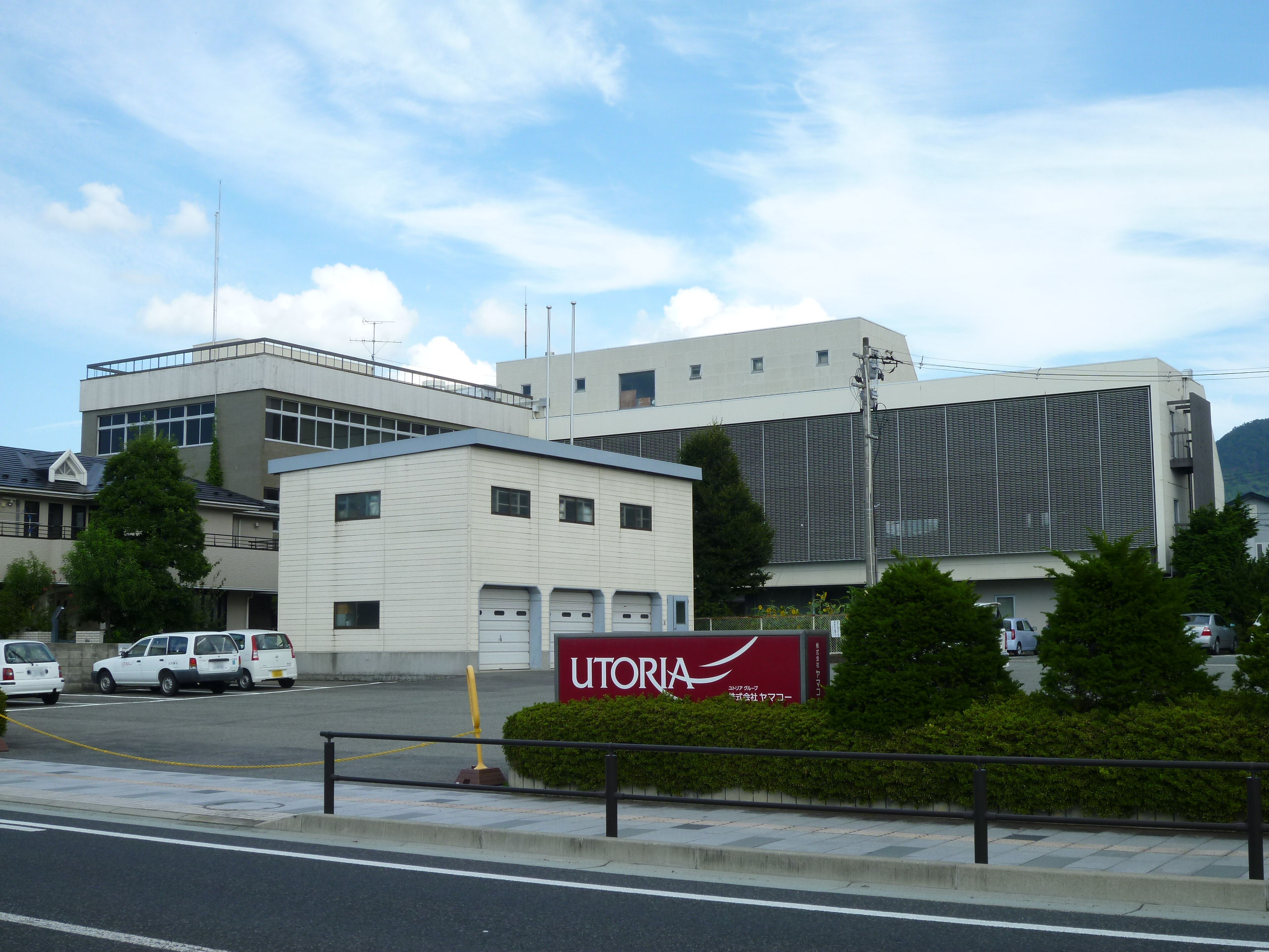 ヤマコー本社（山形市鉄砲町）